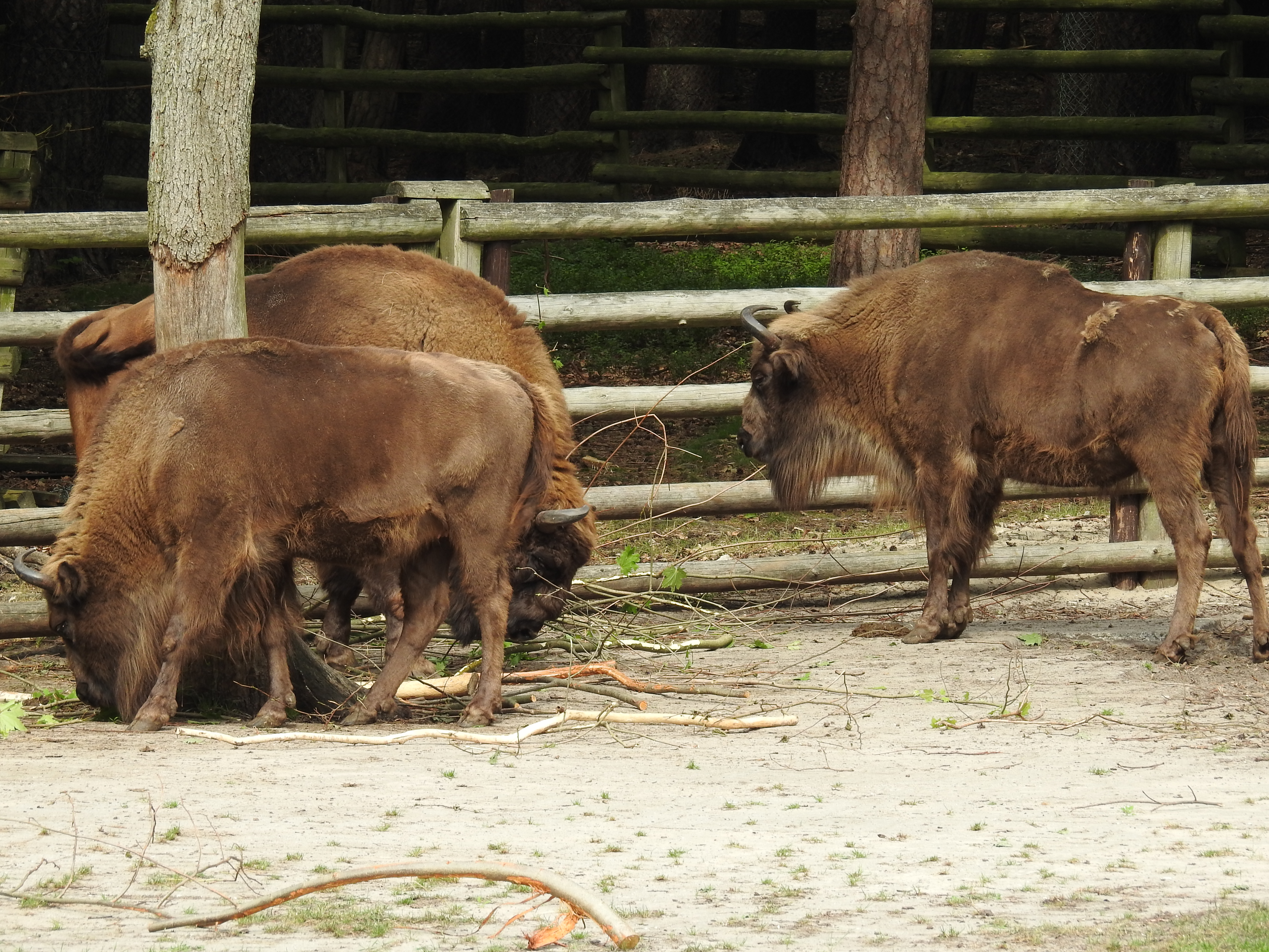 Woliński Park Narodowy Zagroda Pokazowa Żubrów_stado żubrów